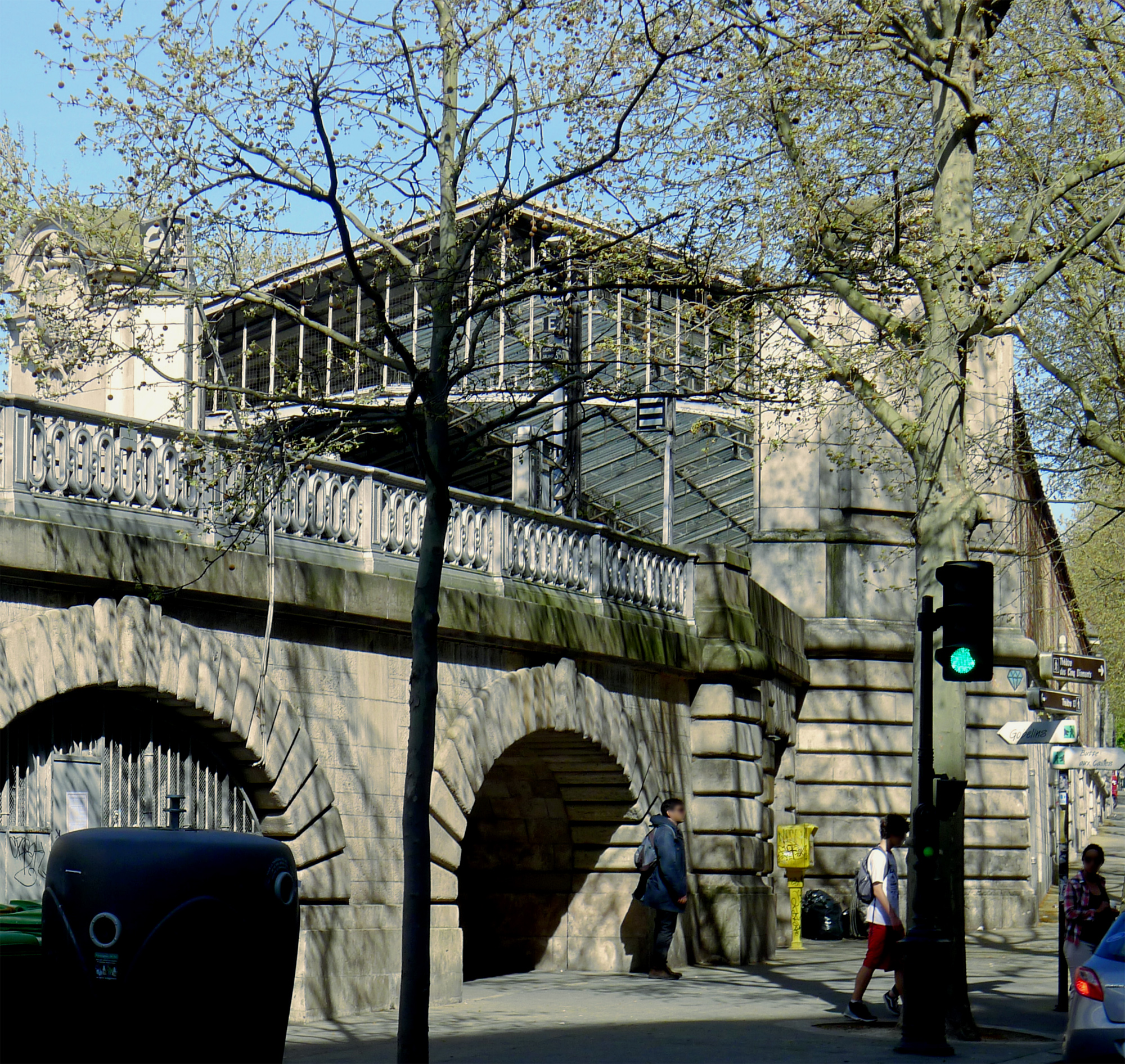 Boulevard Auguste-Blanqui (station de métro Corvisart) - Paris XIII